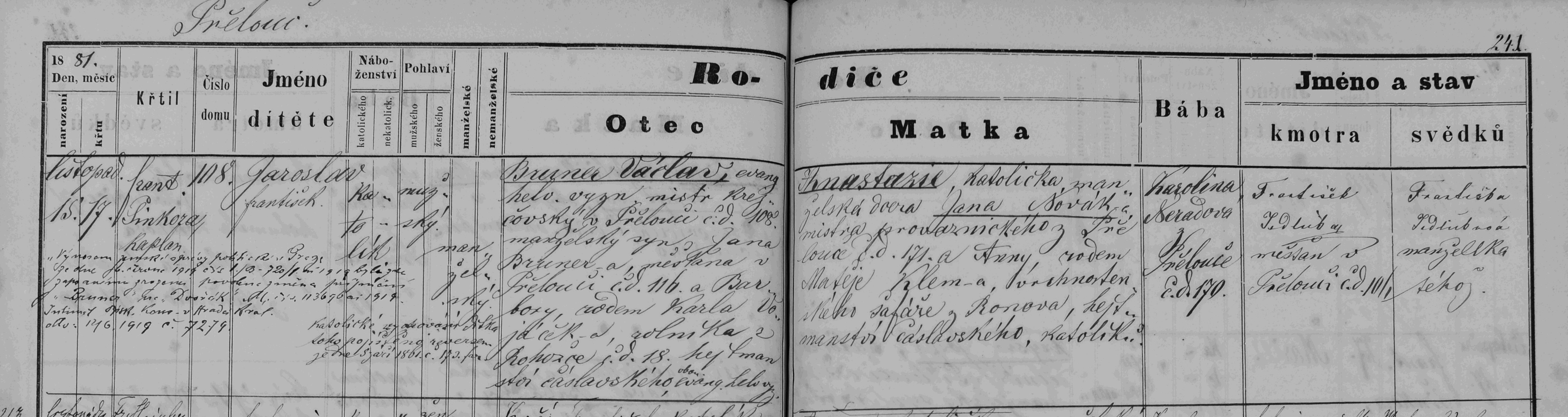 matriční zápis o narození a křtu Jaroslava Brunnera (matrika N 1857-1869 Přelouč (SOA Zámrsk))